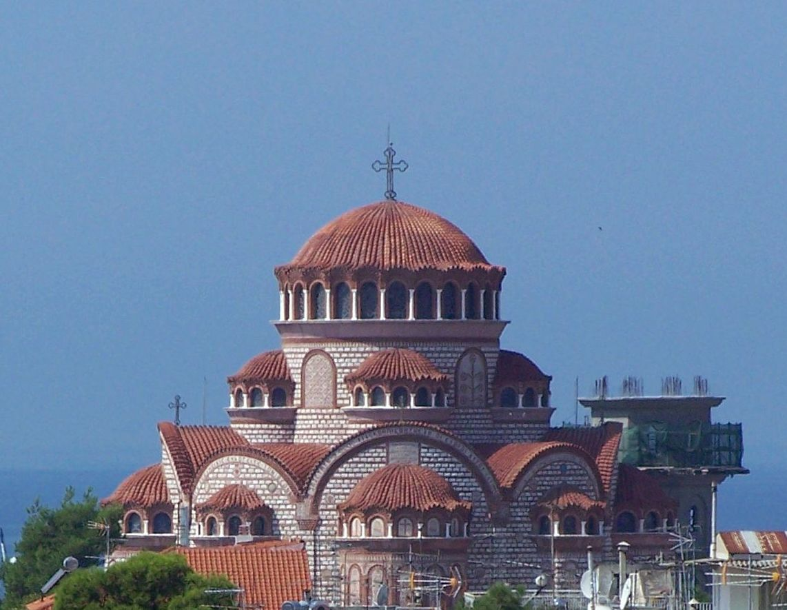 Die Kirche von Nea Moudania